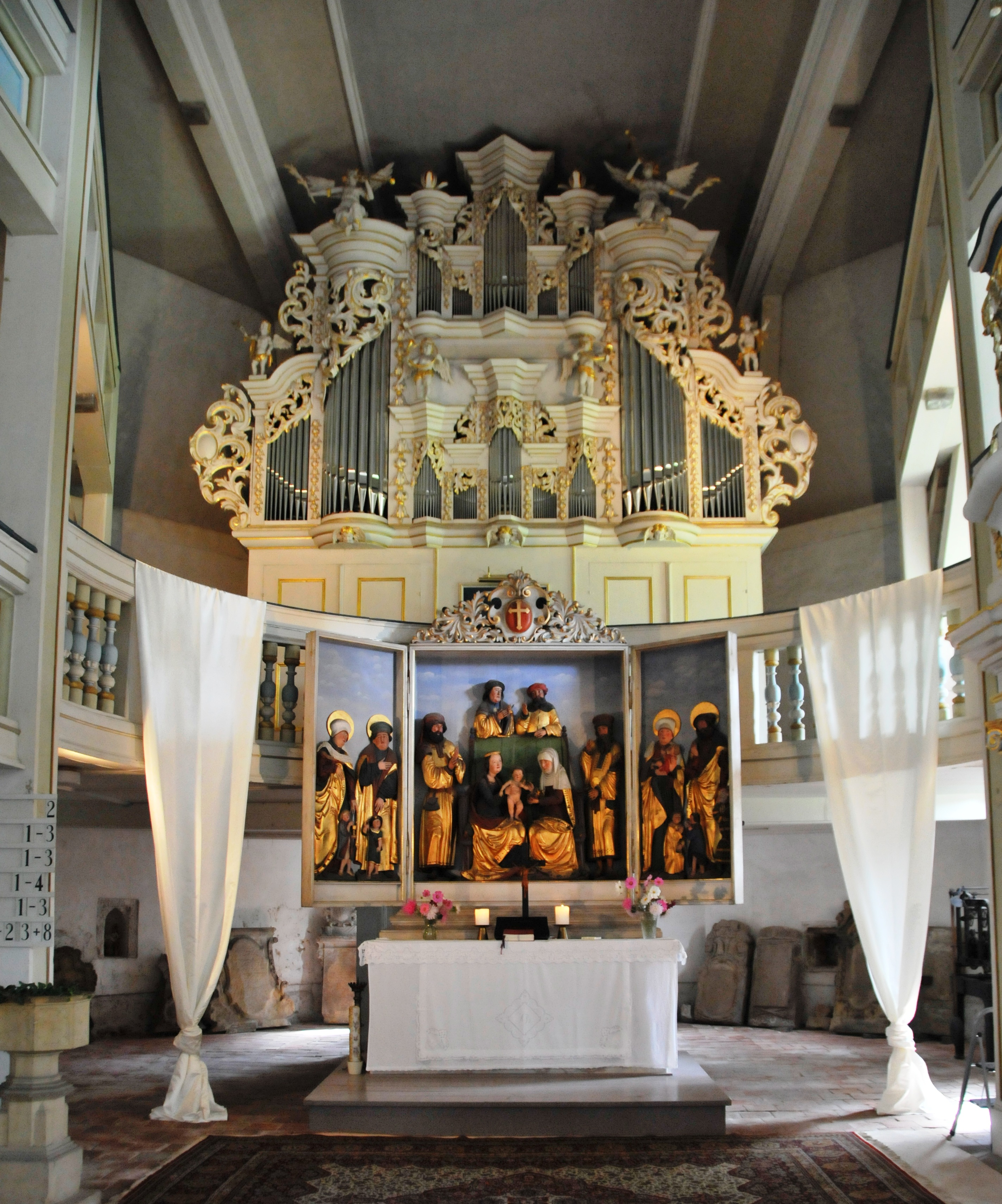 Wandersleben, Kirche, Schröter-Orgel